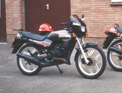 Honda MBX 80